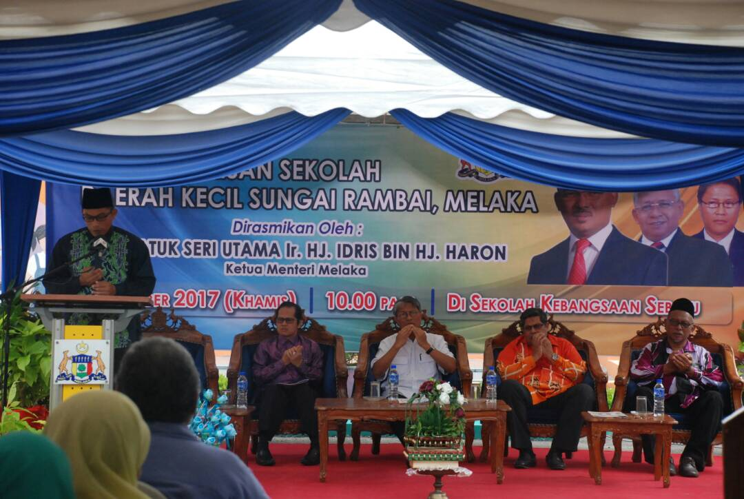 Bacaan doa